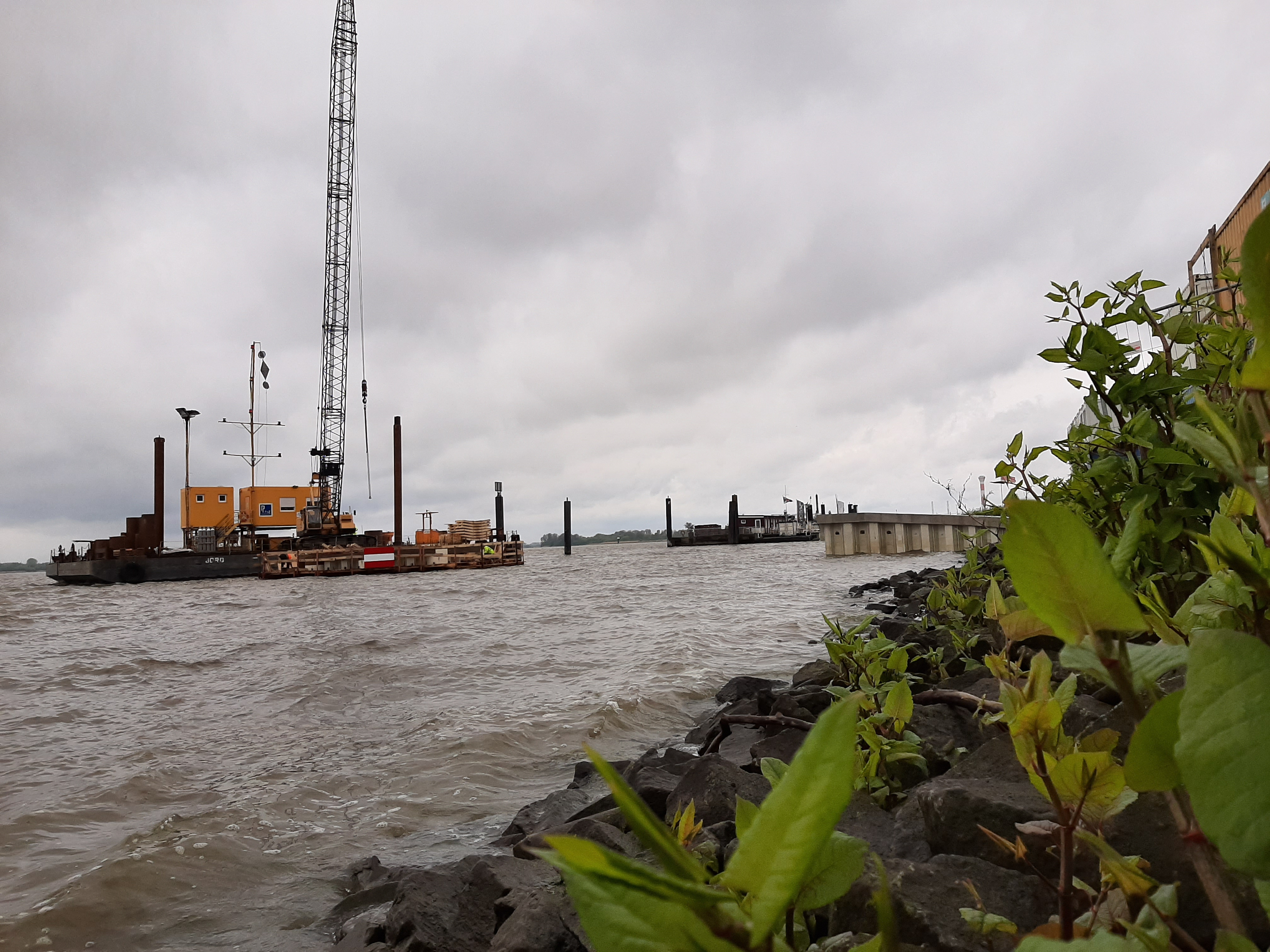 Der im Bau befindliche neue Leuchtturm Unterfeuer Blankenese der Richtfeuerlinie Blankenese.